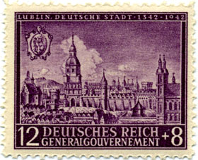 Znaczek 12+8 gr – panorama A. Hogenberga (fragment) Poczta Generalnego Gubernatorstwa, 15 sierpnia 1942, z serii: 600-lecie Lublina